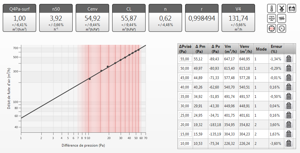 Principales informations illustratives d'un essai d'infiltrométrie d'un bâtiment.